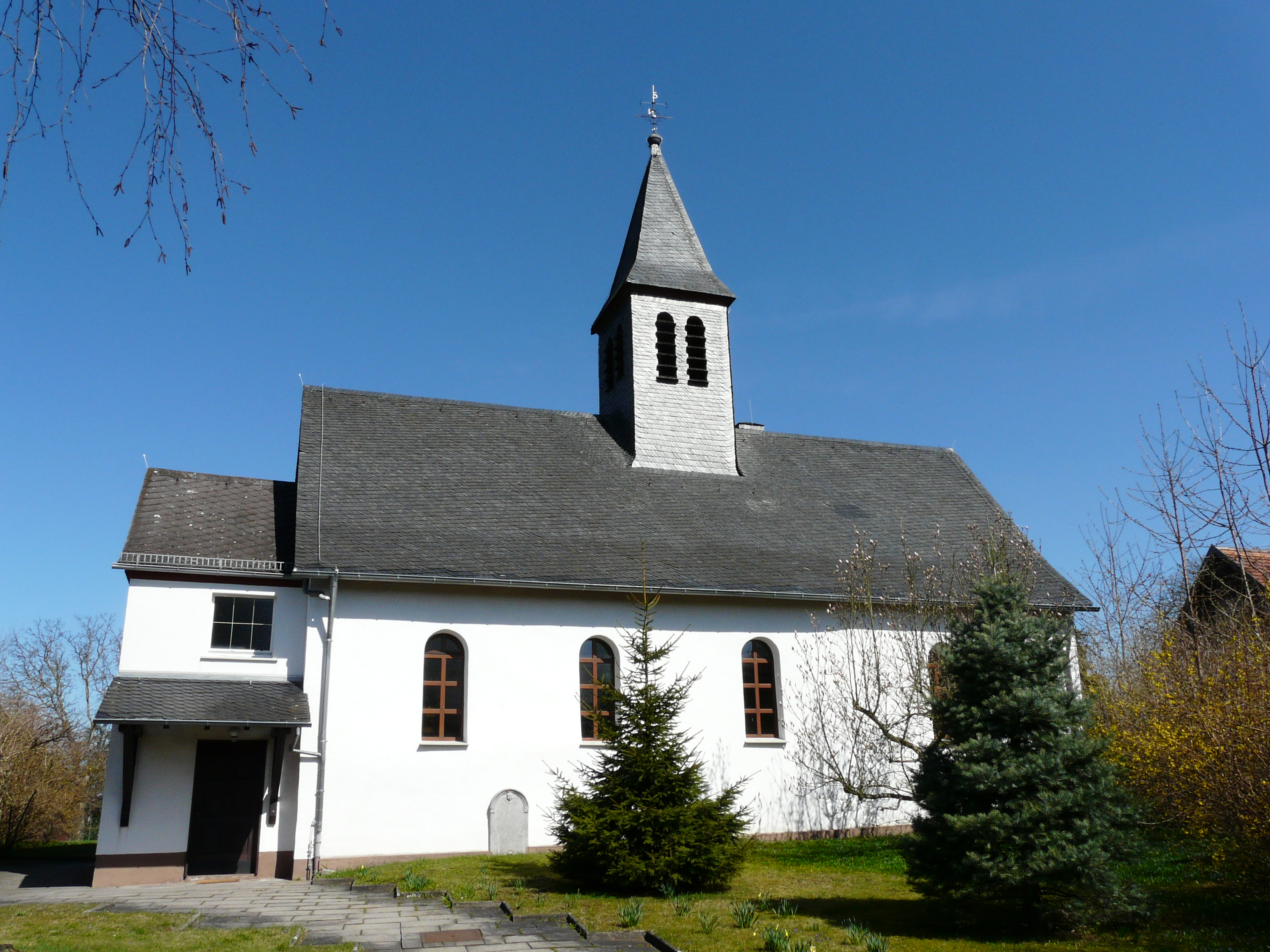 Evangelische Pfarrkirche in Schöffengrund-Oberwetz, Hessen